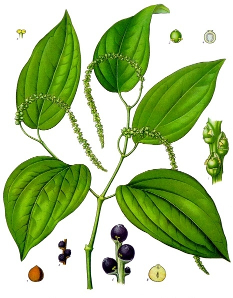 Schwarzer Pfeffer. A blühender Zweig, nat. Grösse; 1 Theil der Blüthenähre, vergrössert (nach Bâillon aus Luerssen); 2 Fruchtknoten, mit Staubgefäss, desgl.; 3 Staubgefäss, desgl.; 4 junge, noch grüne Frucht im Längsschnitt, desgl.; 5, 6 Theil der Fruchtähre, nat. Grösse und vergrössert (der Farbenton ist falsch; er müsste bei 5 roth, bei 6 grün sein; Fig. 6 nach Hayne); 7 Frucht ohne Fruchtschicht, vergrössert; 8 dieselbe im Längsschnitt, desgl.